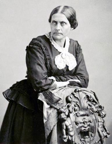 Susan B Anthony